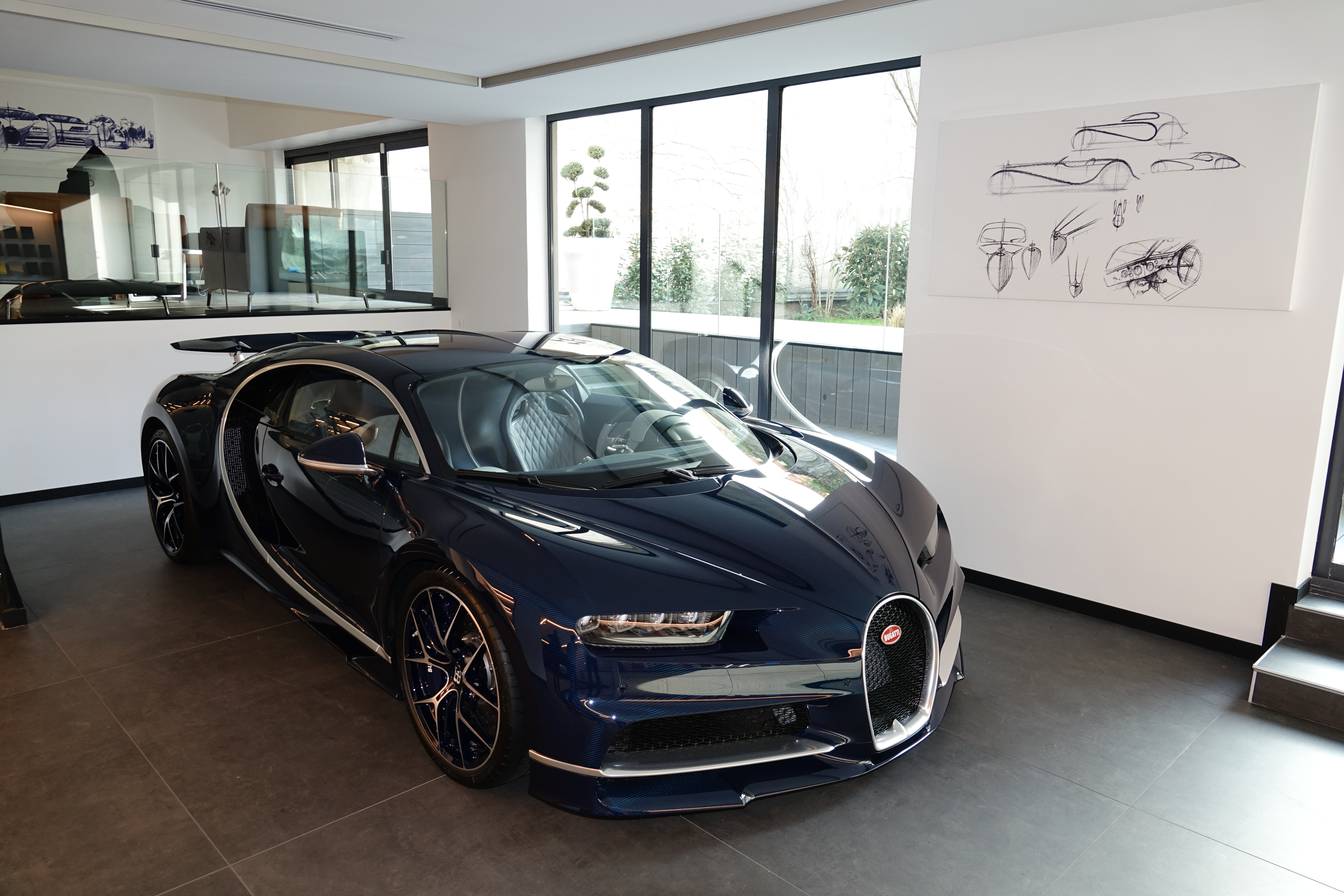 Inauguration show room Bugatti Paris